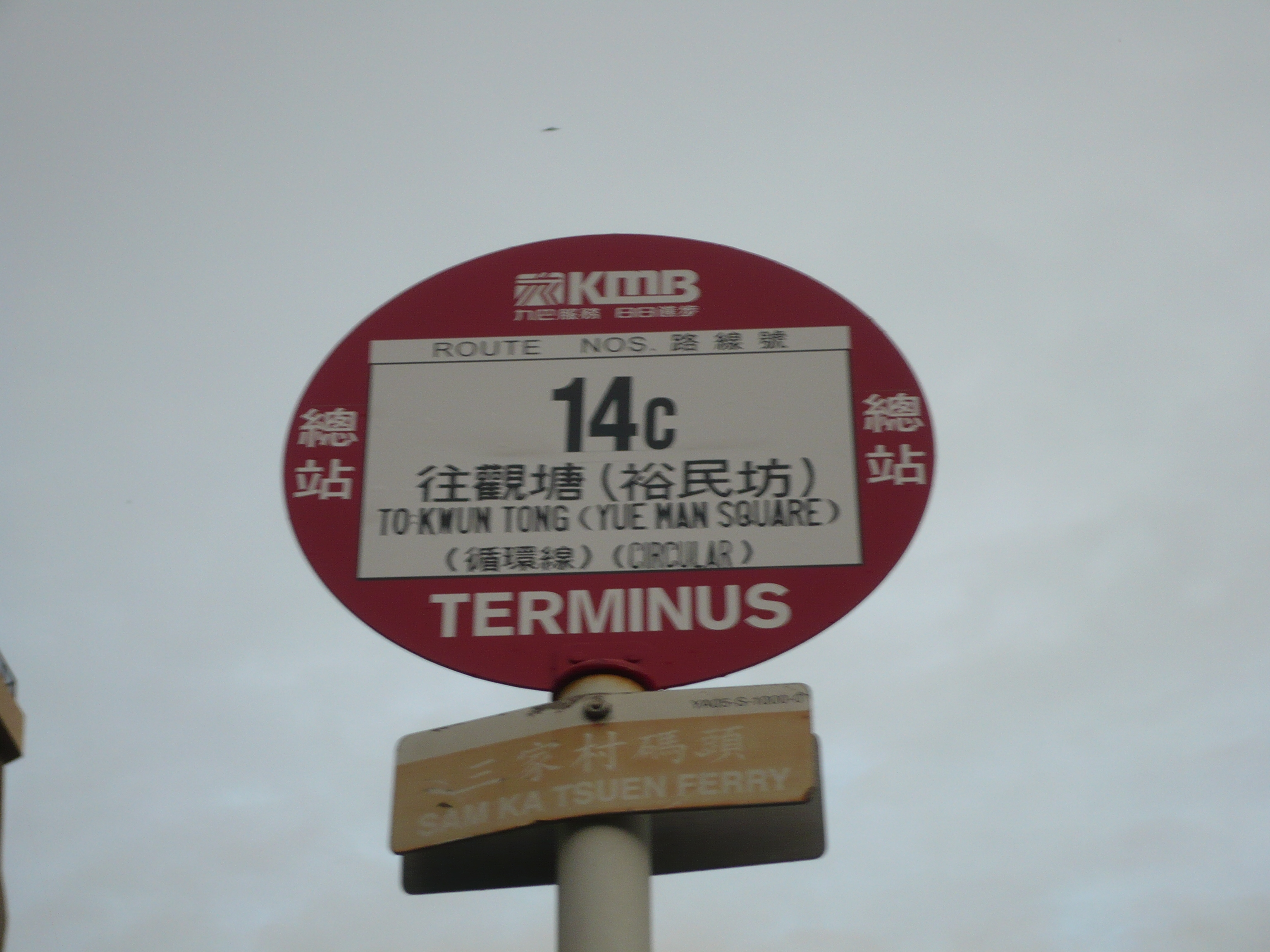 中文（香港）: 鯉魚門（三家村碼頭）巴士總站